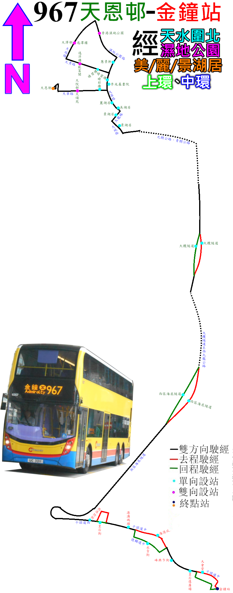 中文（香港）: 過海隧巴967線的走線圖